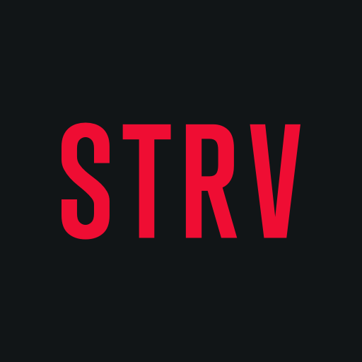 The logo of STRV company, as of 2017